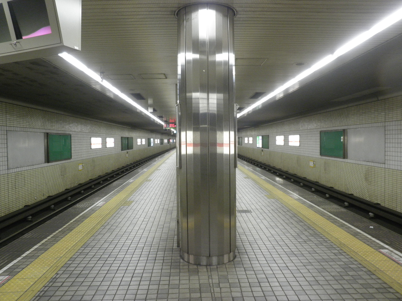 新金岡駅のホーム。